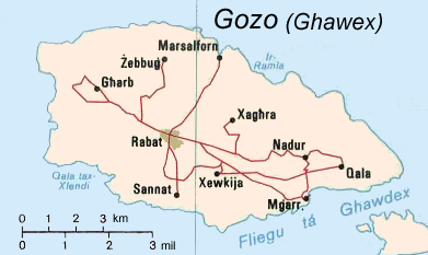 Mapa Gozo z CIA Factbook